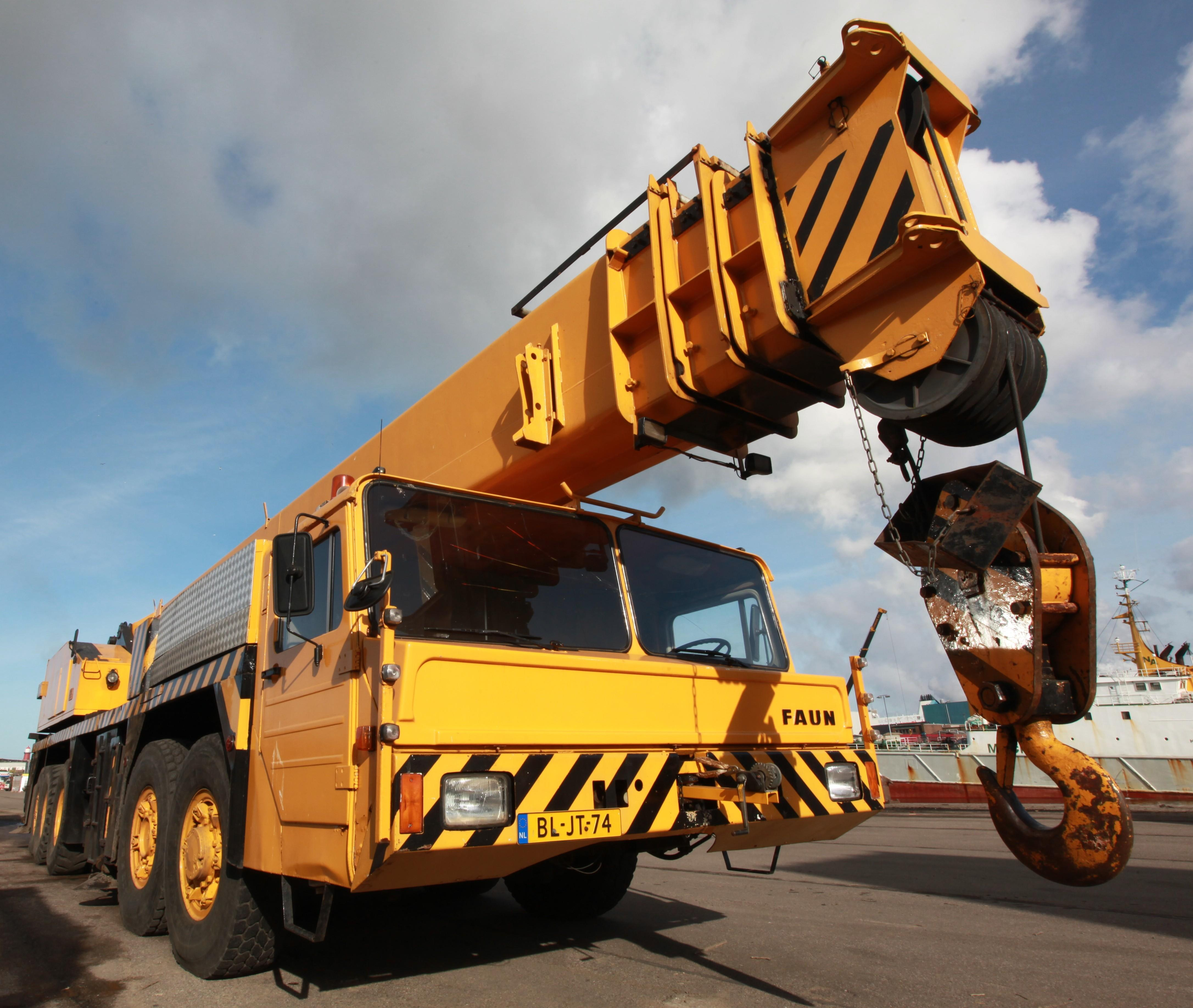 Mobilkran Faun HK 100-05.